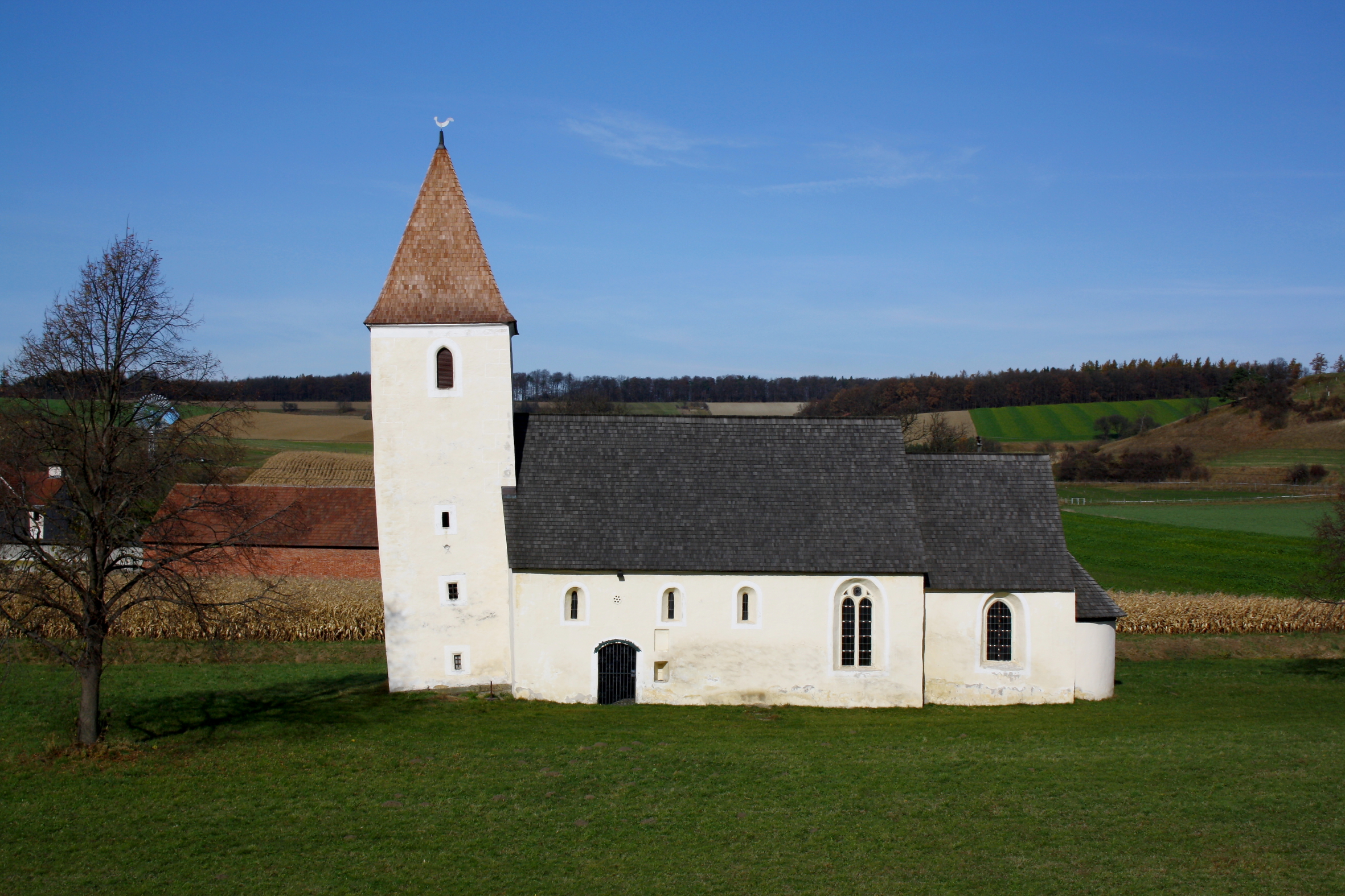 Die Südansicht der Filialkirche Lanzendorf in Böheimkirchen, Niederösterreich.